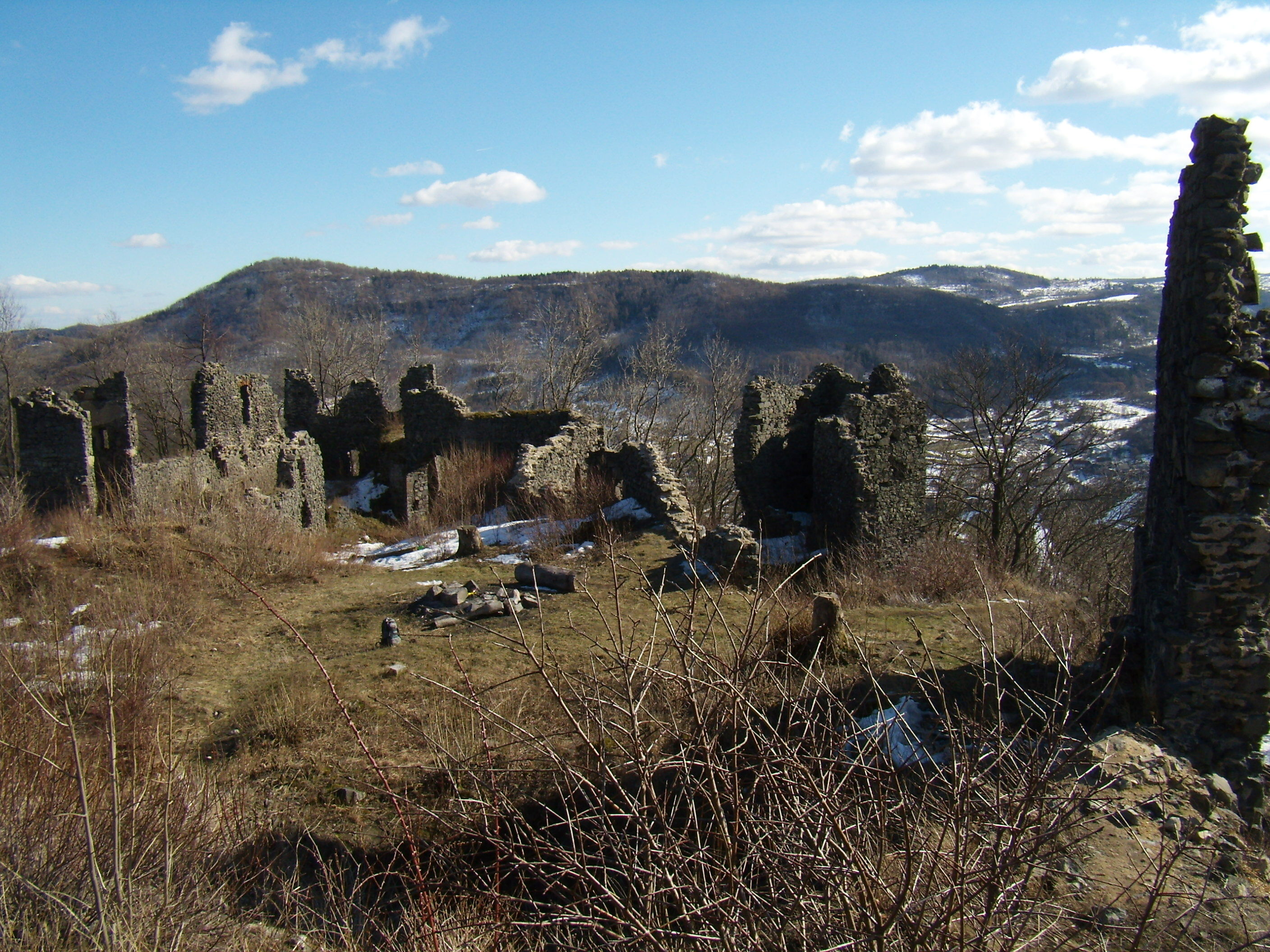 Šumburk